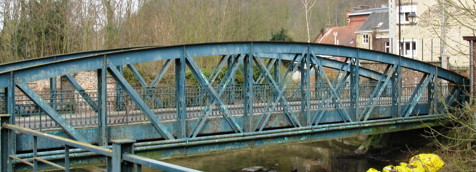 D'Bréck vu Chinet zu Huy. Chinet